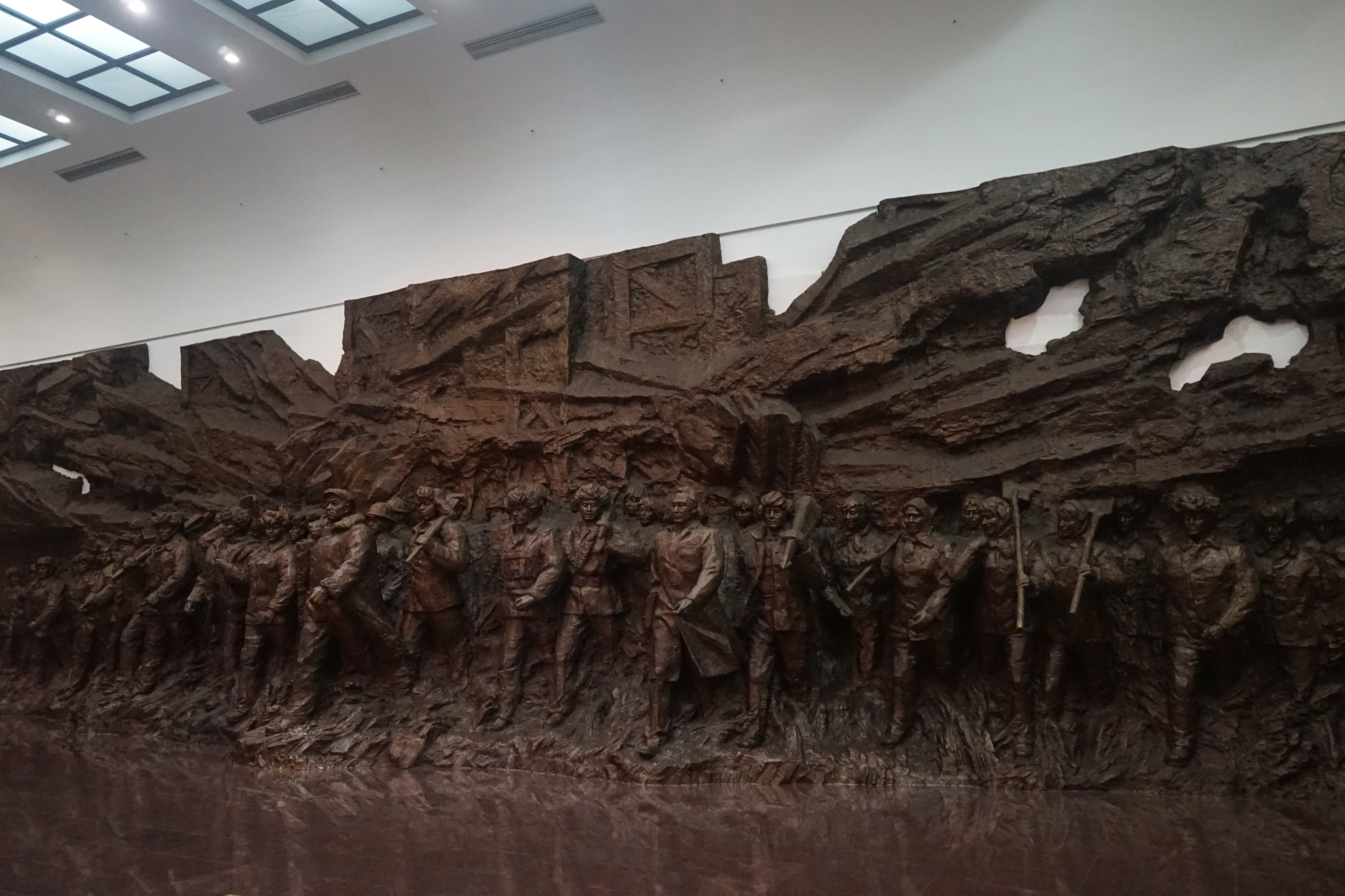 中文（中国大陆）: 铁人馆序厅：浮雕群像